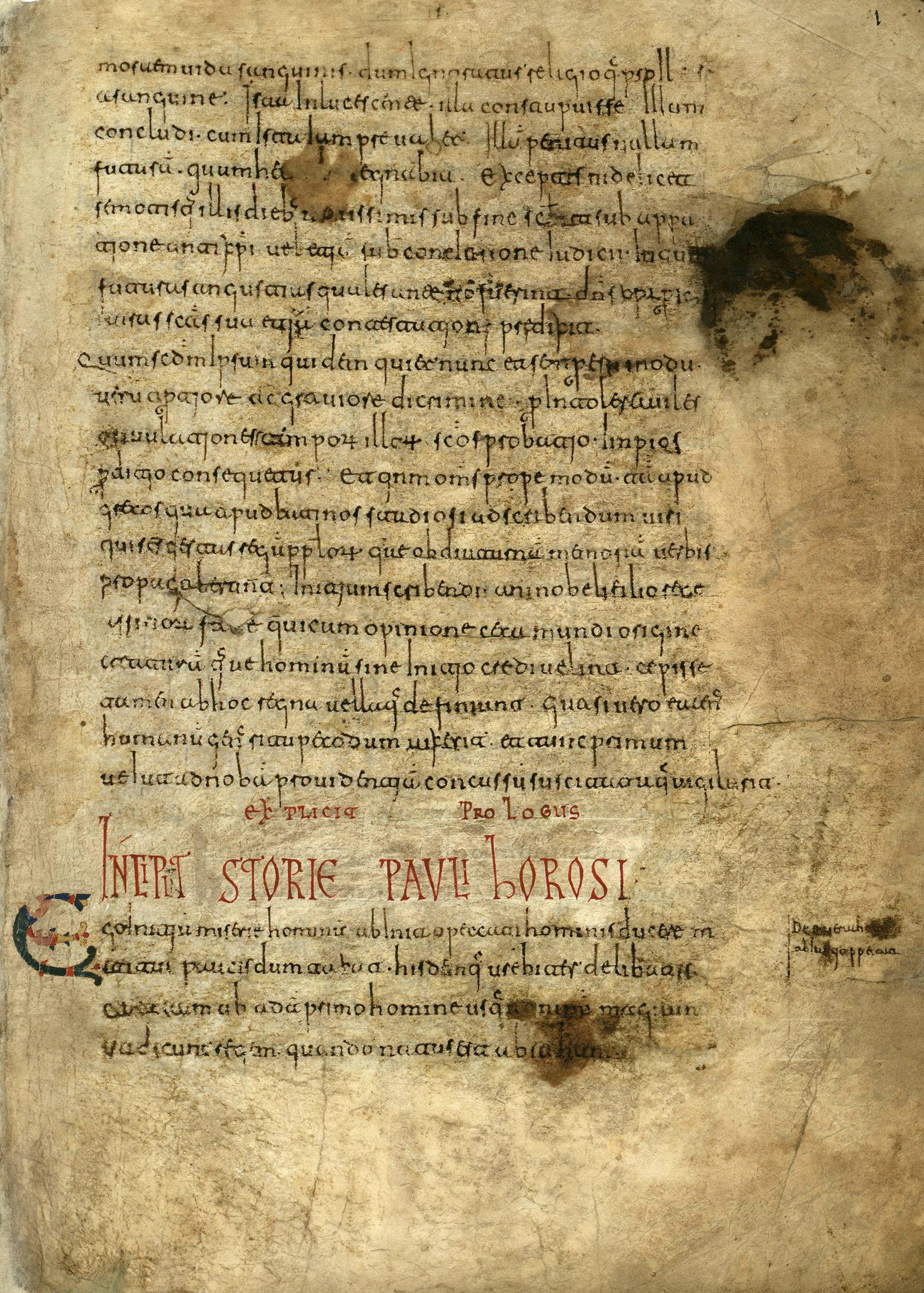 Códice de Roda, folio 1r. El titular, miniado en rojo, es el íncipit de la Historiae adversus paganos de Paulo Orosio, textualmente: Incipit Storie Pauli Horosi. Manuscrito conservado en la Real Academia de la Historia (España), siglo X-XI, 232 folios (29 x 21 cm) en pergamino. Escritura visigótica. Encuadernado en cuadernos de 8 folios. Caja de escritura 23 x 15 cm o menores. Texto a línea tirada, menos los folios 161r.-176v. en los que el texto es a doble columna. Con lagunas en el texto, incompleto y parcialmente mutilado. Títulos con capitales visigóticas miniadas en rojo y azul; iniciales primarias polícromas, ornamentadas: zoomóficas, de lacerías, etc.; las secundarias: rellenas, fitomórficas, etc.; en el f. 197r. se reproduce Babilonia y en el f. 197v., Ninive y Toledo; en el f. 200v. mapamundi de San Isidoro; en el f. 206r. Adoración de los Reyes Magos; en el f. 232r. notación musical. Contenido: Contenido parcial: Storie Pauli Horosi (h. 1r.-155r.) El códice se divide en dos bloques: 1º) Paulo Orosio, Historia (Storie Pauli Horosi), f. 1r.-155r. 2º) Diversas crónicas y textos misceláneos, f. 156r.-232r. Entre los que se encuentran: Fragmentos de San Isidoro: Historia Wandalorum (f. 156r.-157v.), Historia Suevorum (f. 157v.-167r.), Chronica (f. 159r.-167r.) e [Historia Gothorum] (f. 167r.-176v) Chronica Adephonsi III (h. 178r.-185r.) [Chronica prophetica] (f. 186r.-189v.) Collectiones in epistolas et evangelia: Passio Domini nostri Ihesu Christi / Smaragdus [Sancti Michaelis], (O.S.B.) Fragmentos sobre el Credo o el Árbol de la ciencia Fuente: ficha de la RAH Encuadernación moderna en piel y tejuelo con el título Colección de cronicones